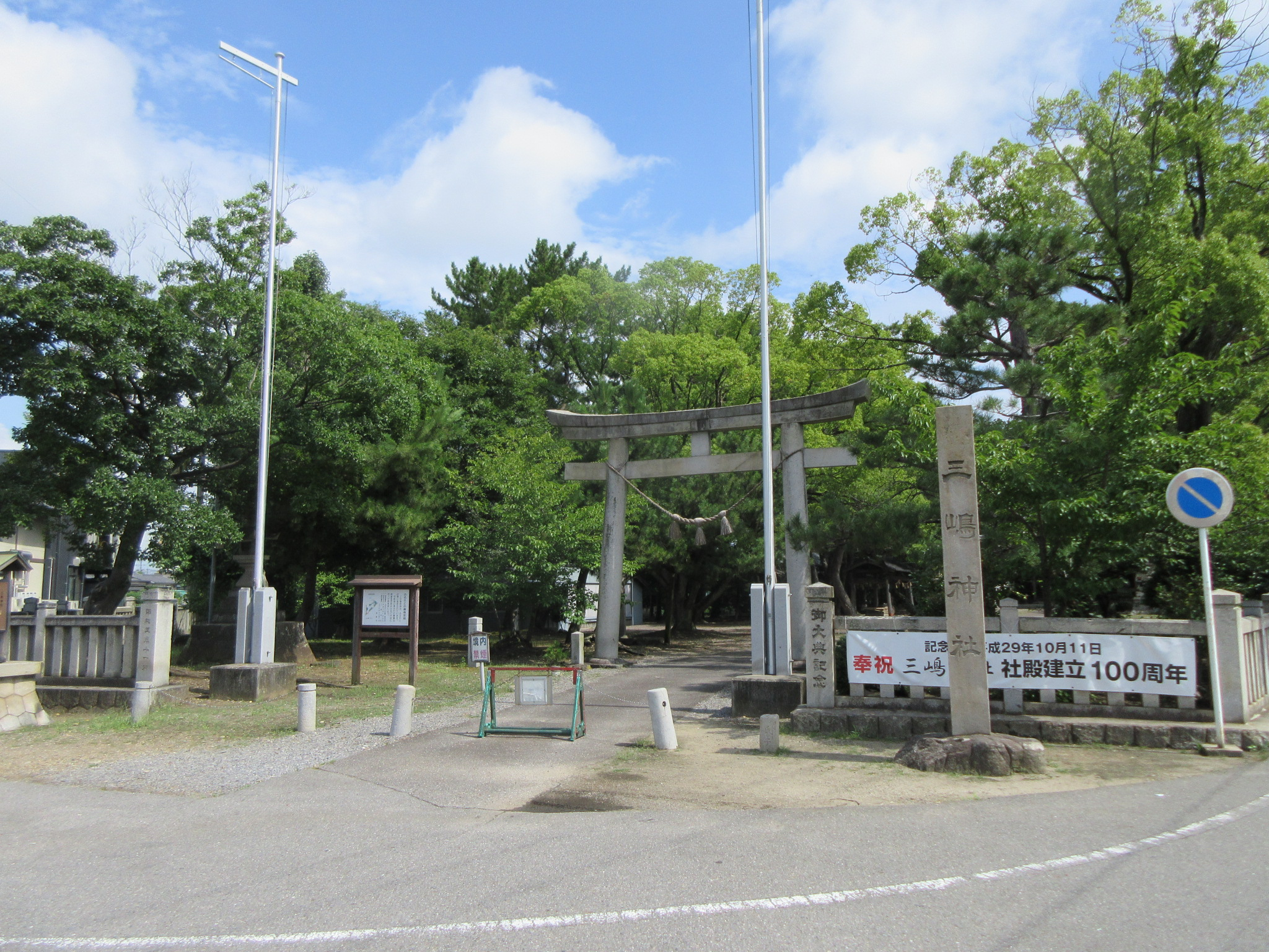 三嶋神社（岡崎市上六名町）